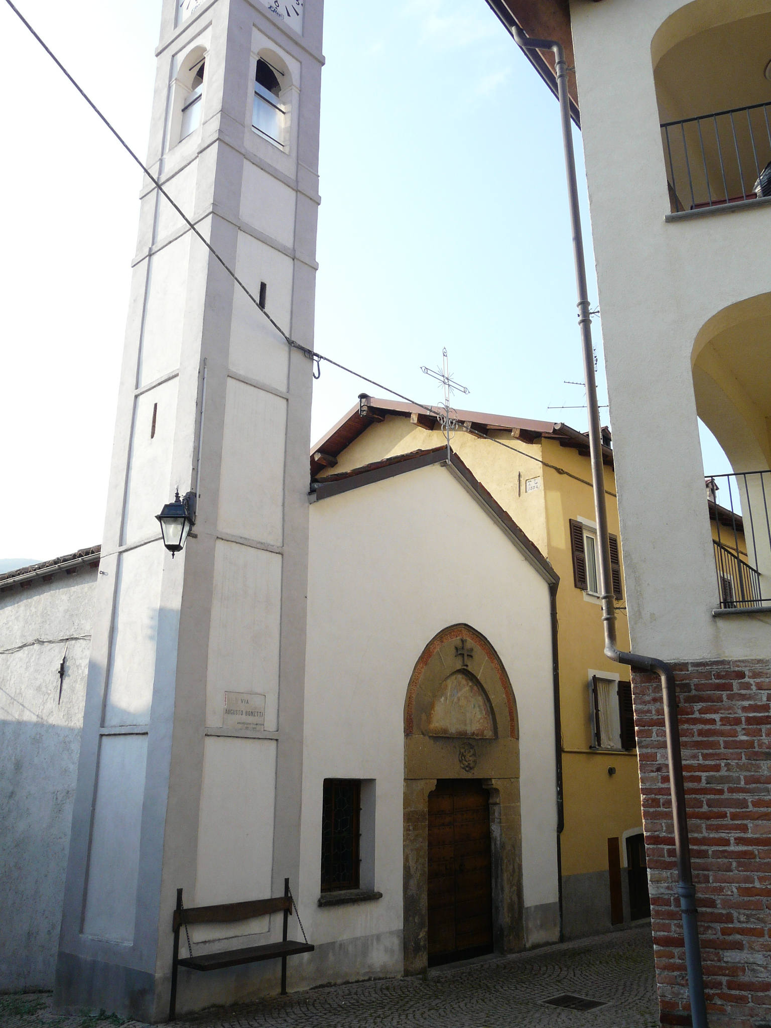 Chiesa di San Pietro, Borgata di Piano, Murialdo, Liguria, Italia